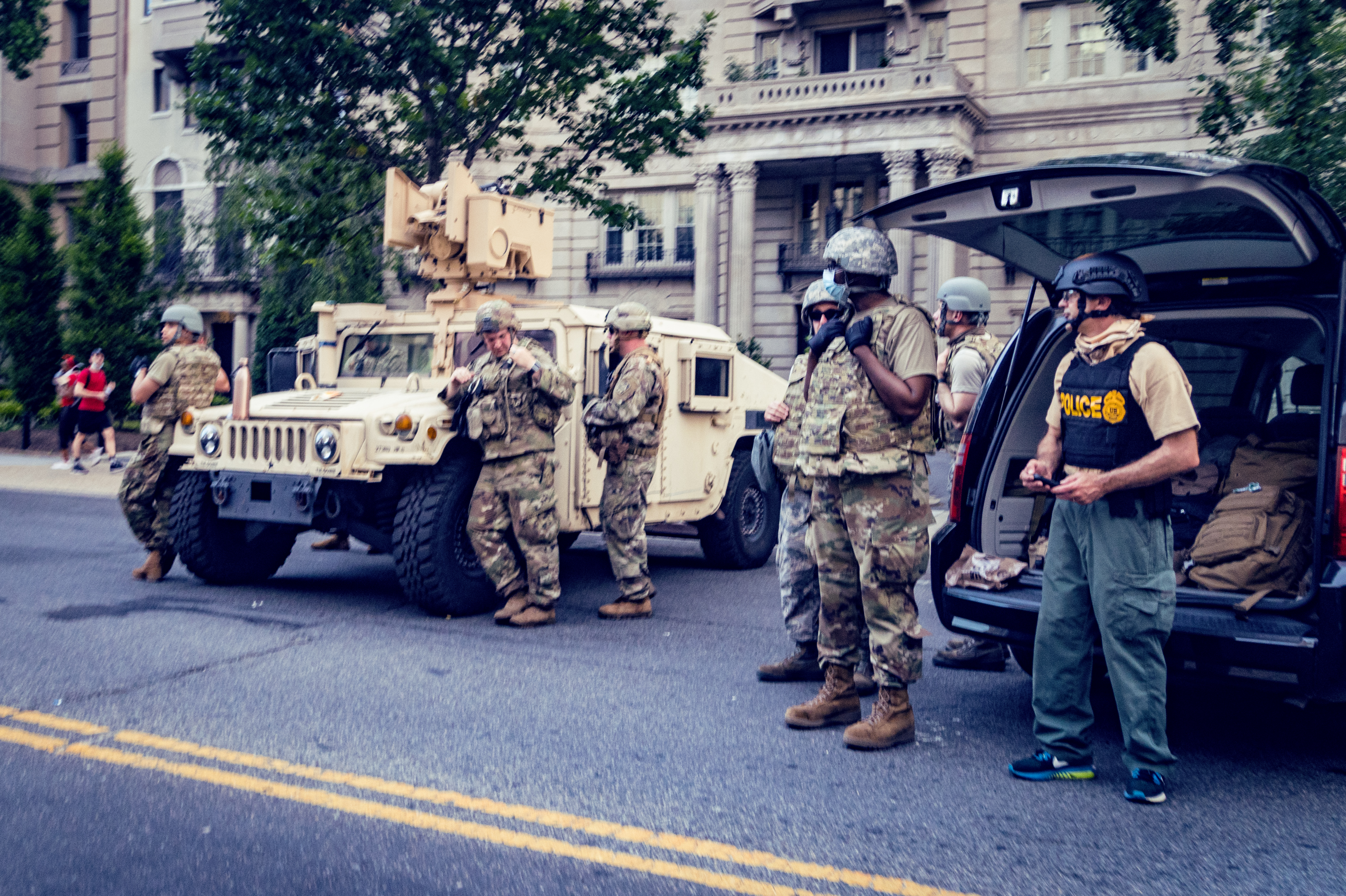 2020.06.03 Protesting the Murder of George Floyd, Washington, DC USA